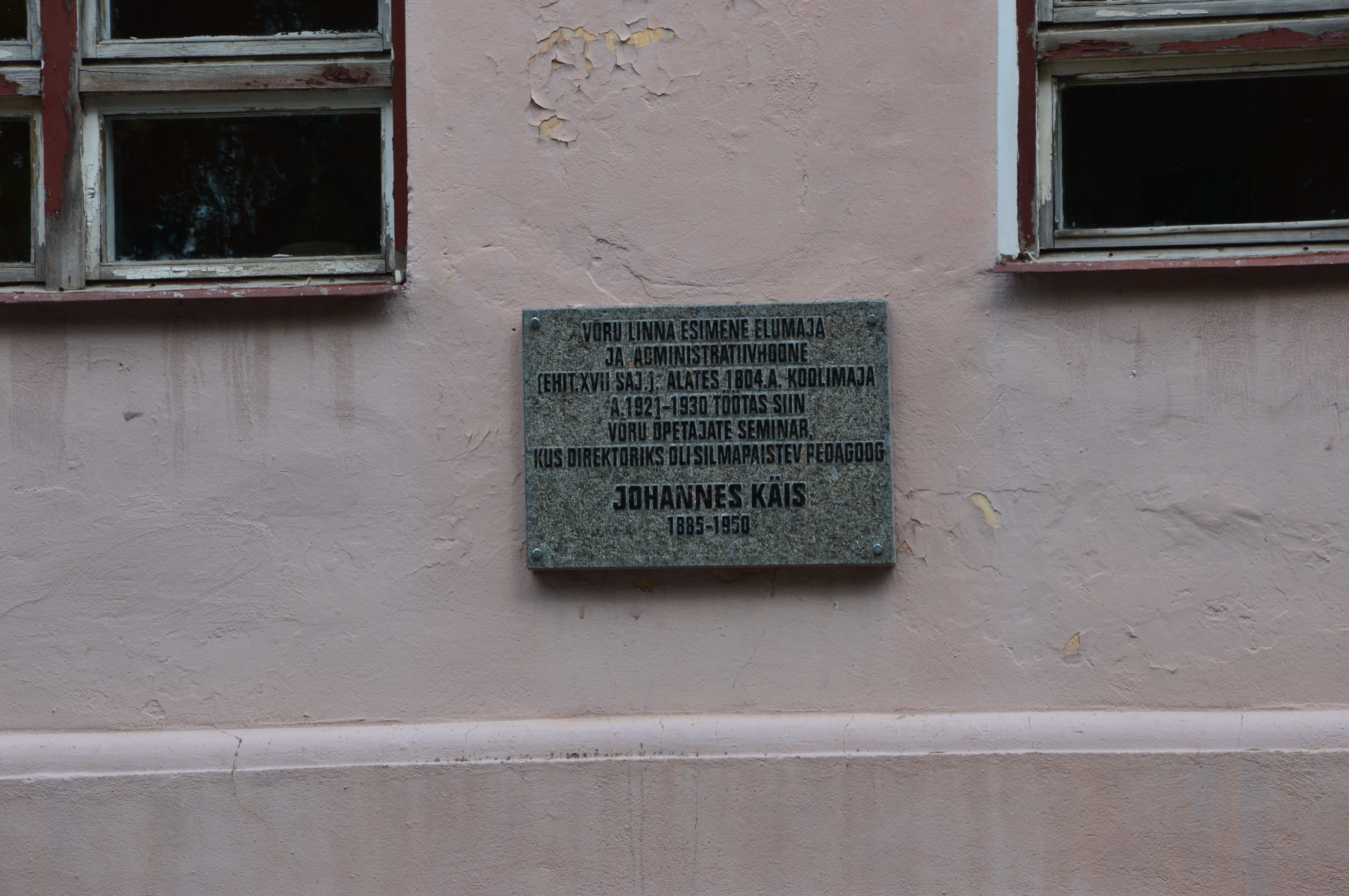 Võru I Põhikool. Vanim hoone Võrus.